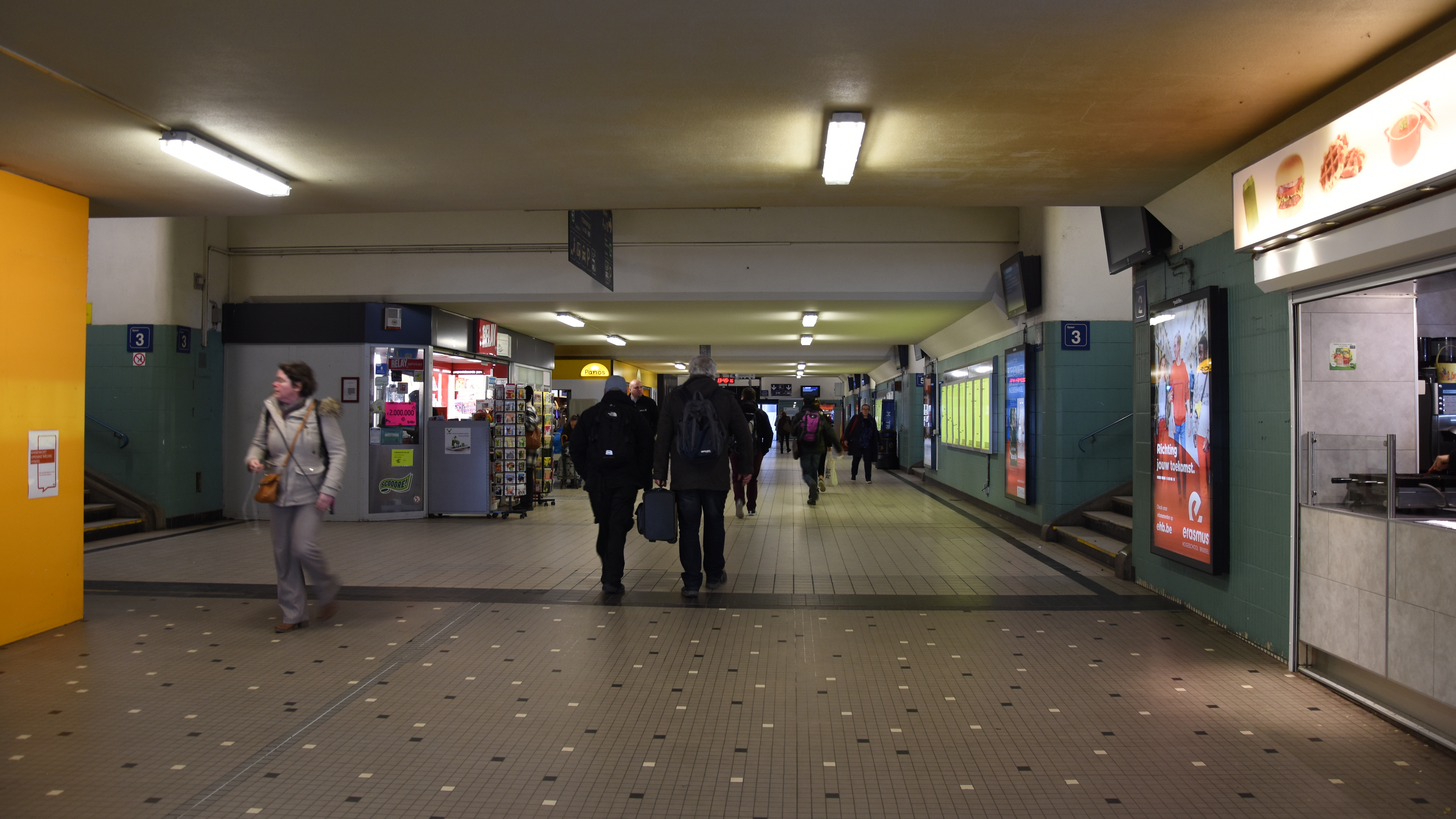 De centrale gang van het treinstation van Mechelen